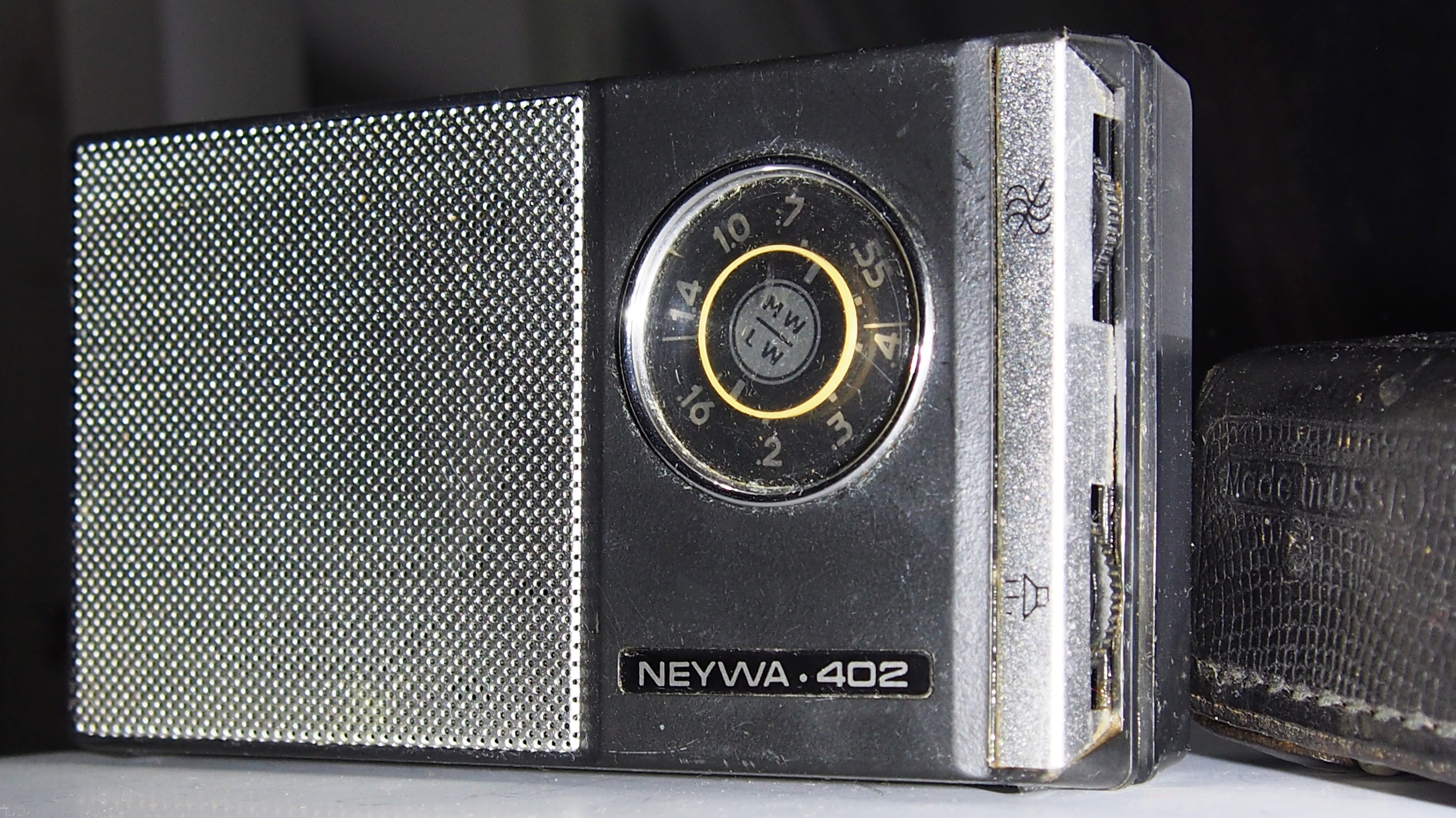 Радиоприёмник 4-го класса Neywa-402 - ДВ и СВ супергетеродин с питанием от батареи Крона. Чувствительность приёмника в диапазоне ДВ - 1,5 мВ/м, СВ - 0,8 мВ/м. Избирательность по соседнему каналу 26 дБ. Номинальная выходная мощность 100 мВт. Диапазон частот звука, воспроизводимых при помощи громкоговорителя 0,25ГД-10 - 450...3150 Гц. Размеры радиоприёмника - 140х80х41 мм. Масса 370 гр. Цена - 32 рубля 65 копеек. В комплект входил кожаный футляр с ремнём для переноски.